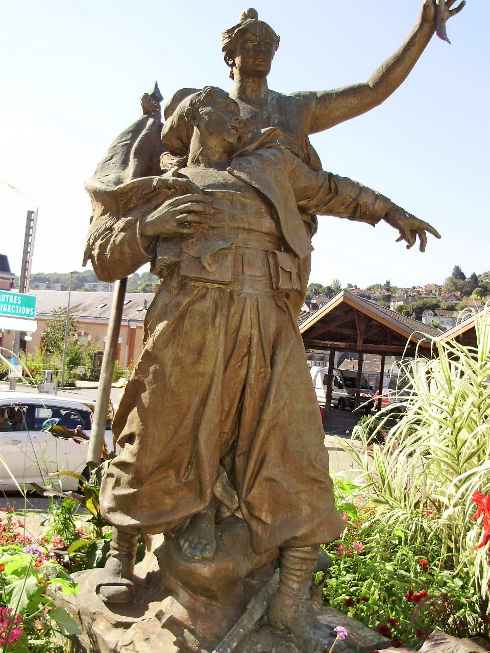 La statue du sergent Lovy à Tulle, vue de face.